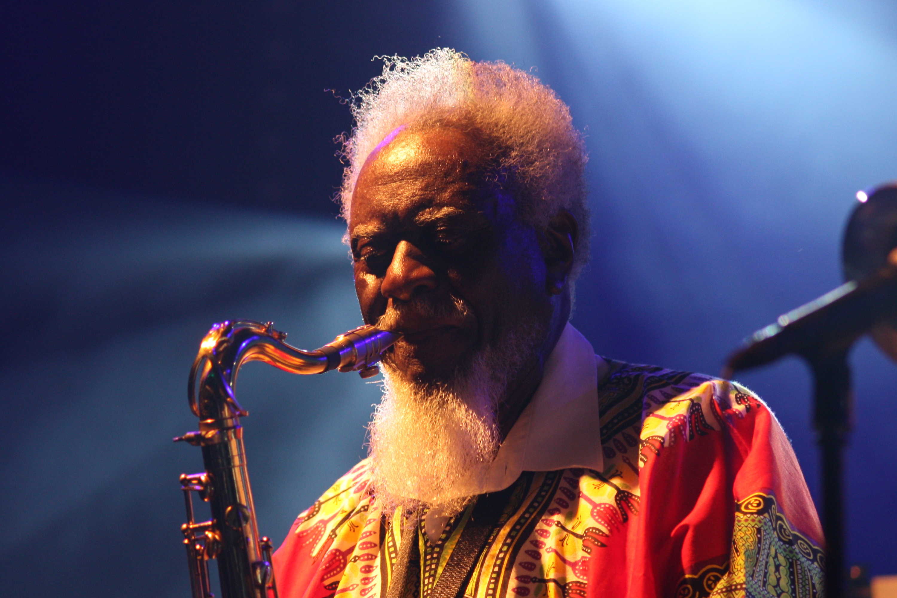 44. Deutsches Jazzfestival Frankfurt 2013: Pharoah Sanders